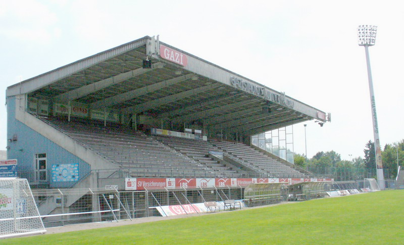 Stuttgart-Degerloch GAZi-Stadion Haupttribüne